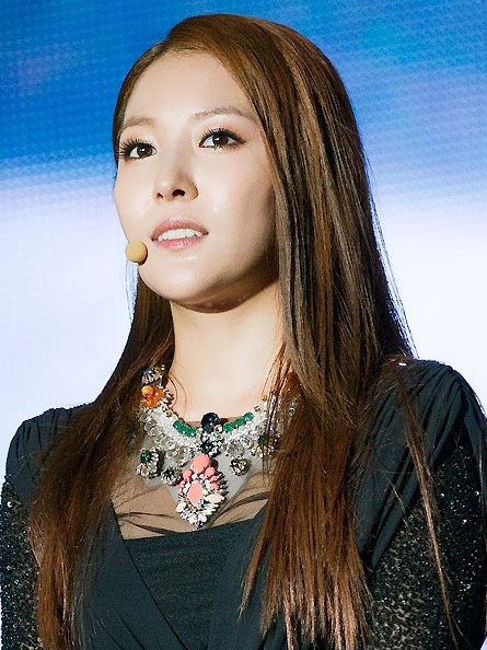 120818-sm콘서트보아